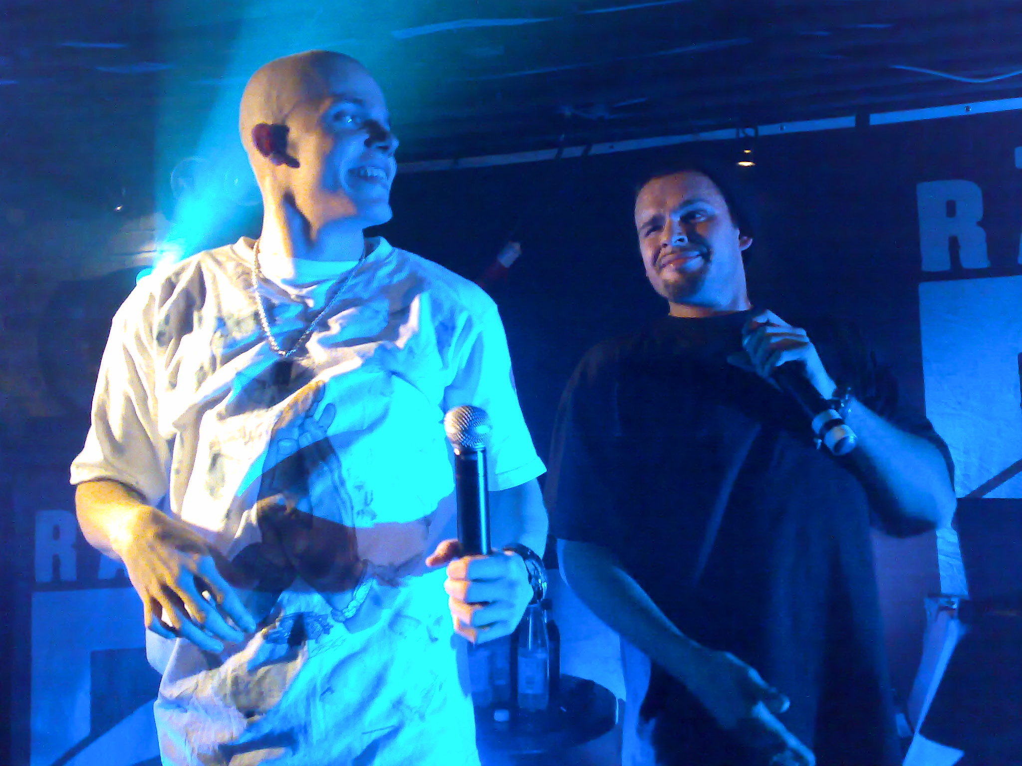 Elastinen ja Timo Pieni Huijaus @ Bepop, Kajaani